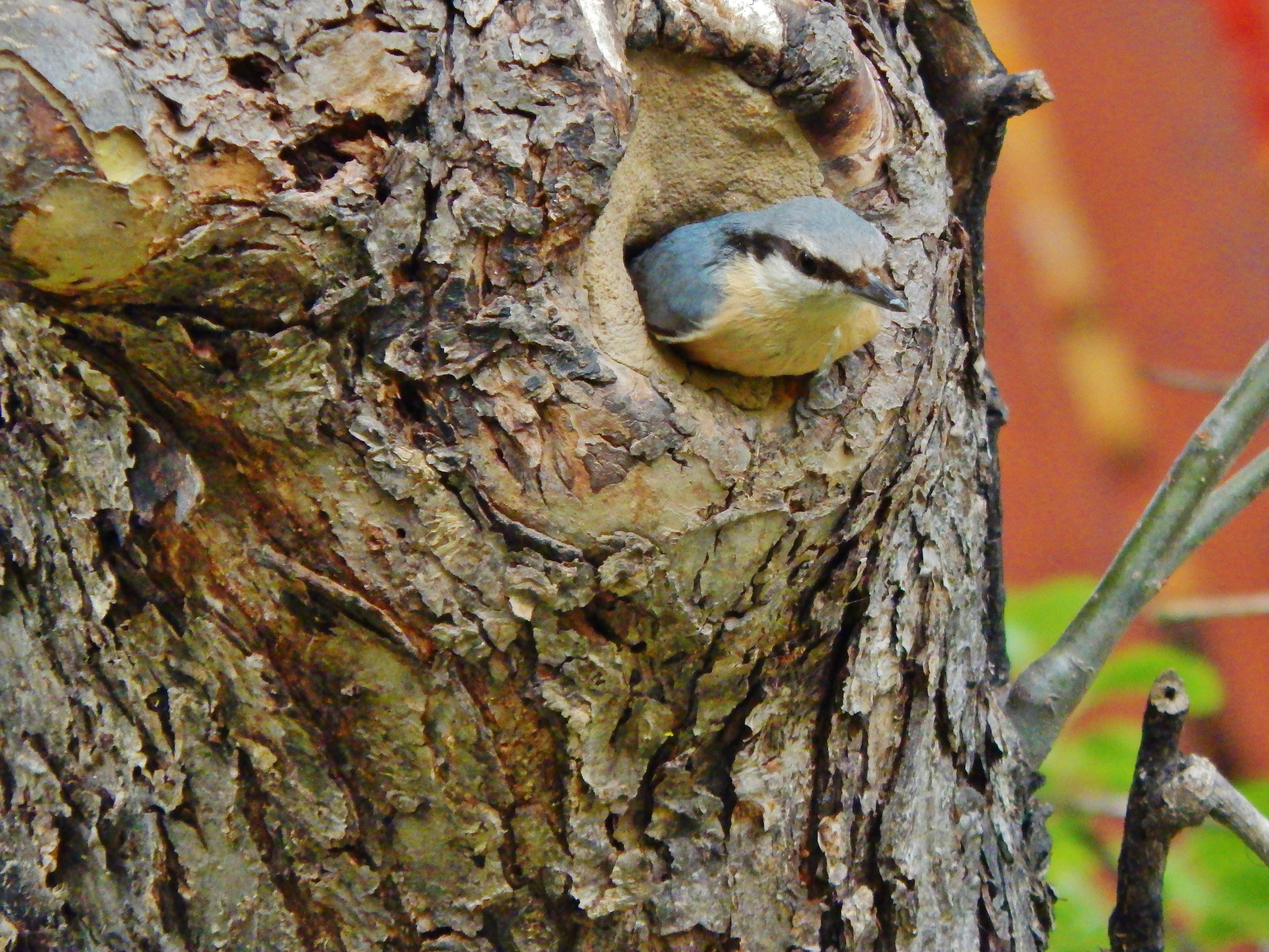 Blitzartig sind die Vögel rein und raus.